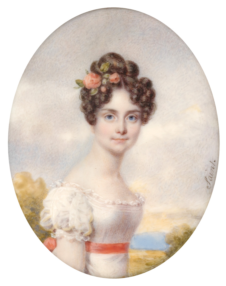 Colette de Reiset (1805-1833), baronne de Beurnonville